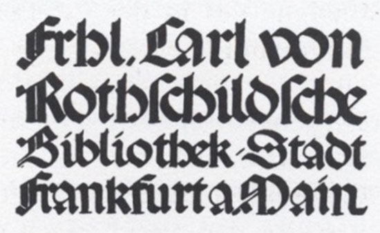 Ex Libris of the Freiherrlich Carl von Rothschild'sche öffentliche Bibliothek in Frankfurt am Main